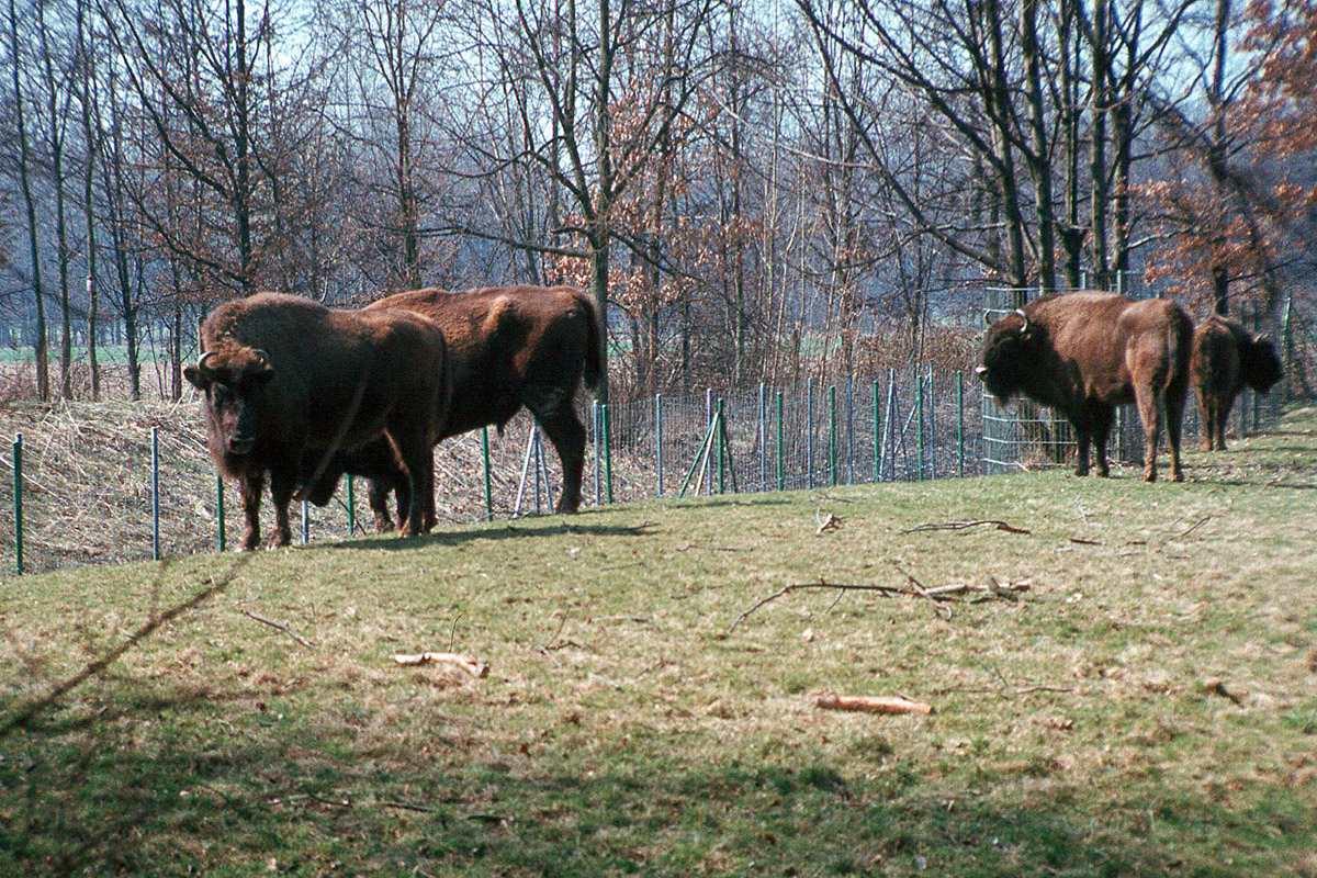 Im Gelände des künftigen Niddaparks gab es in den 1970er Jahren eine Dependance des Frankfurter Zoos